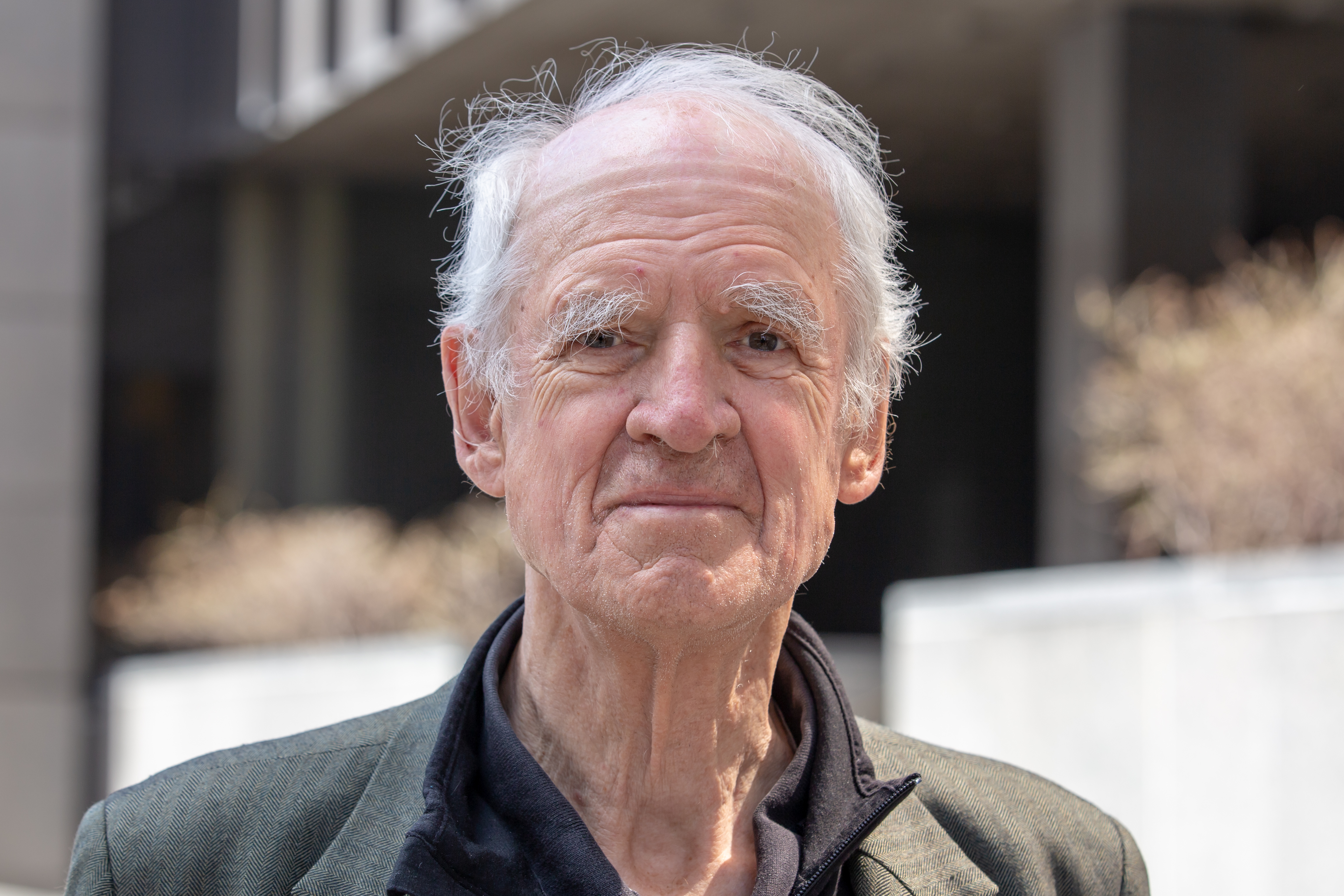 Portrait du philosophe Charles Taylor réalisé lors d'un rassemblement devant le Palais de justice de Montréal.